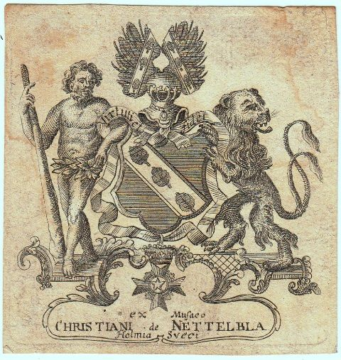 Ex Libris von Christian Nettelbla(dt)